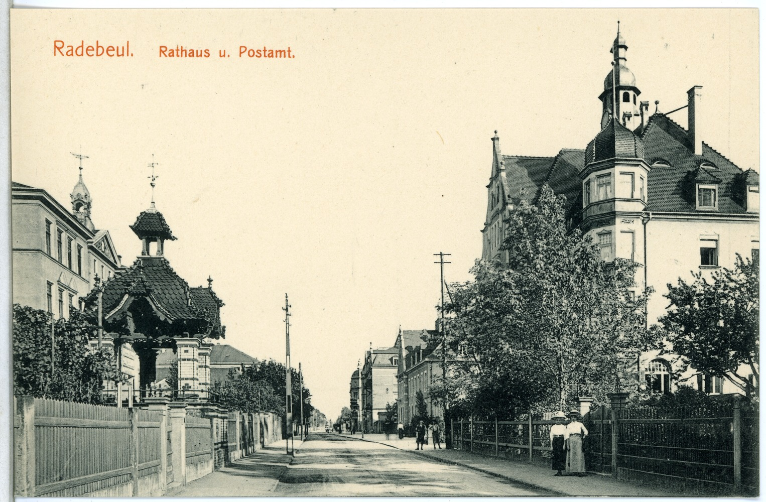 Radebeul; Rathaus und Postamt This postcard is from publisher Brück & Sohn in Meißen ( postcard has a unique number 14254 and is available in a higher resolution at the publisher. This images was uploaded in a cooperation project between Wikipedians and the publisher.